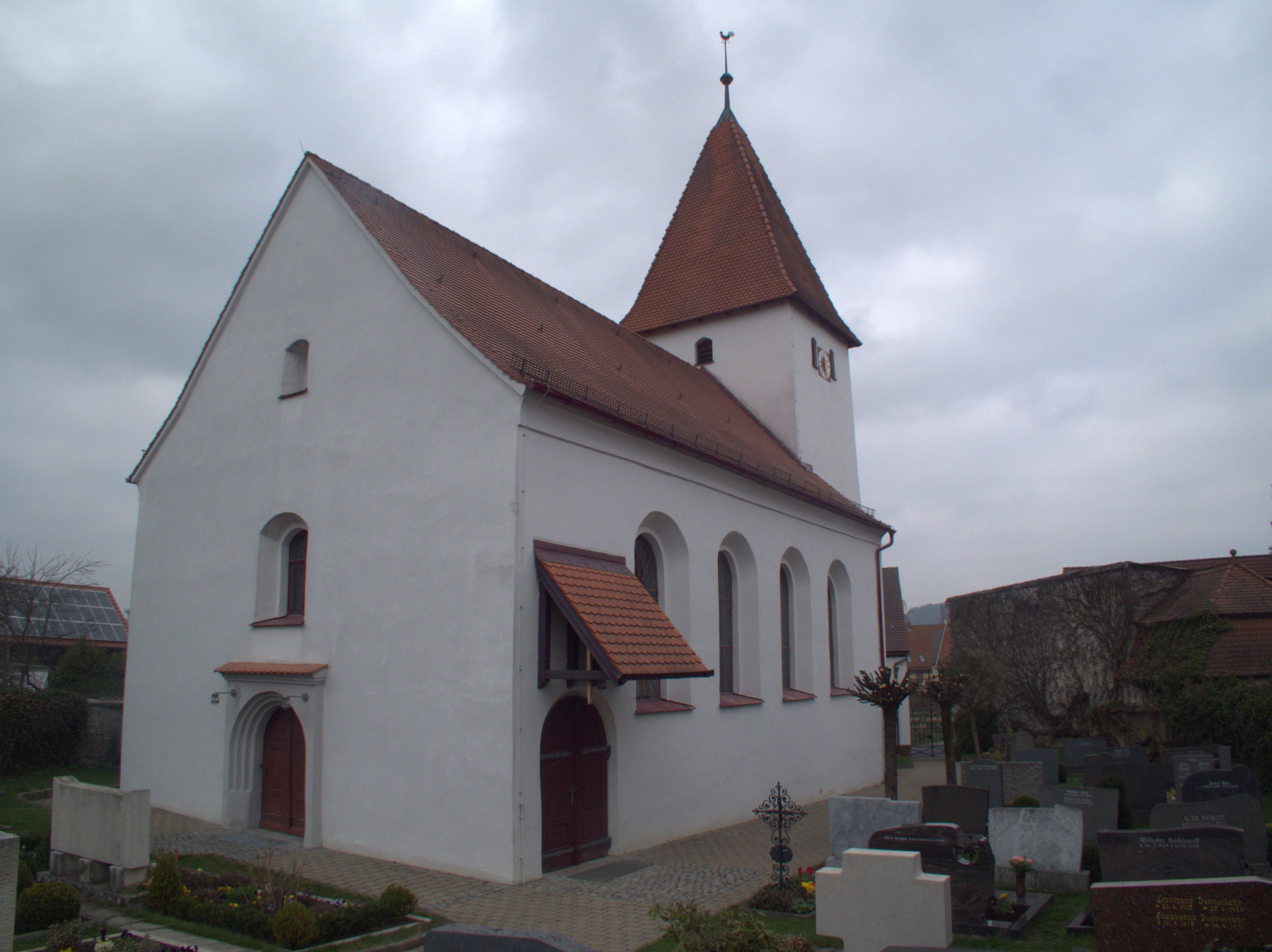 Die aus dem 15. Jahrhundert stammende evangelische Martinskirche in der oberpfälzischen Gemeinde Mühlhausen